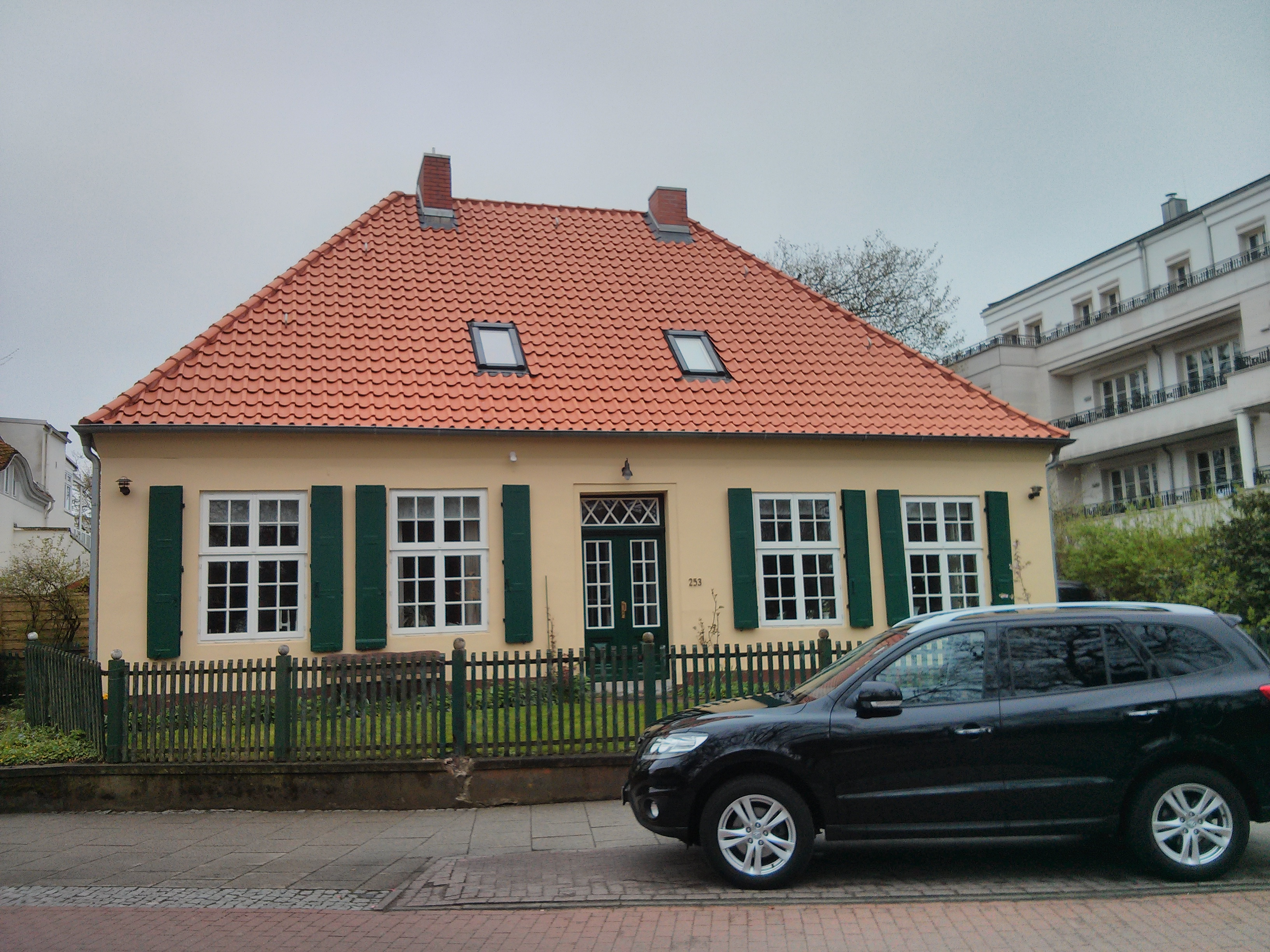 Müllerwohnhaus in Bremen, Schwachhauser Heerstraße 253 Das abgebildete Objekt ist ein geschütztes Kulturdenkmal in der Freien Hansestadt Bremen, mit der Nr. 1131 beim Landesamt für Denkmalpflege registriert.